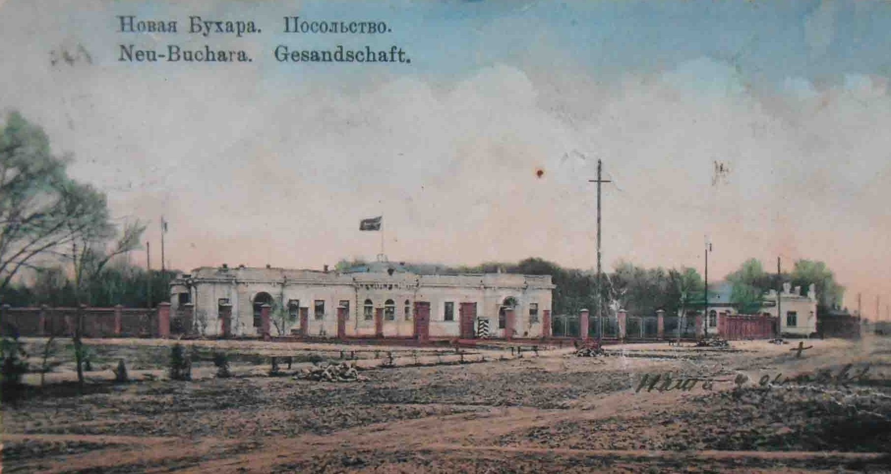 Новая Бухара. Резиденция политического агента Российской империи. 1910.